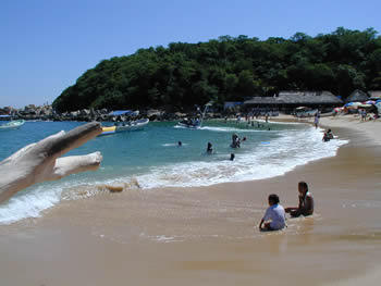 Puerto angelito